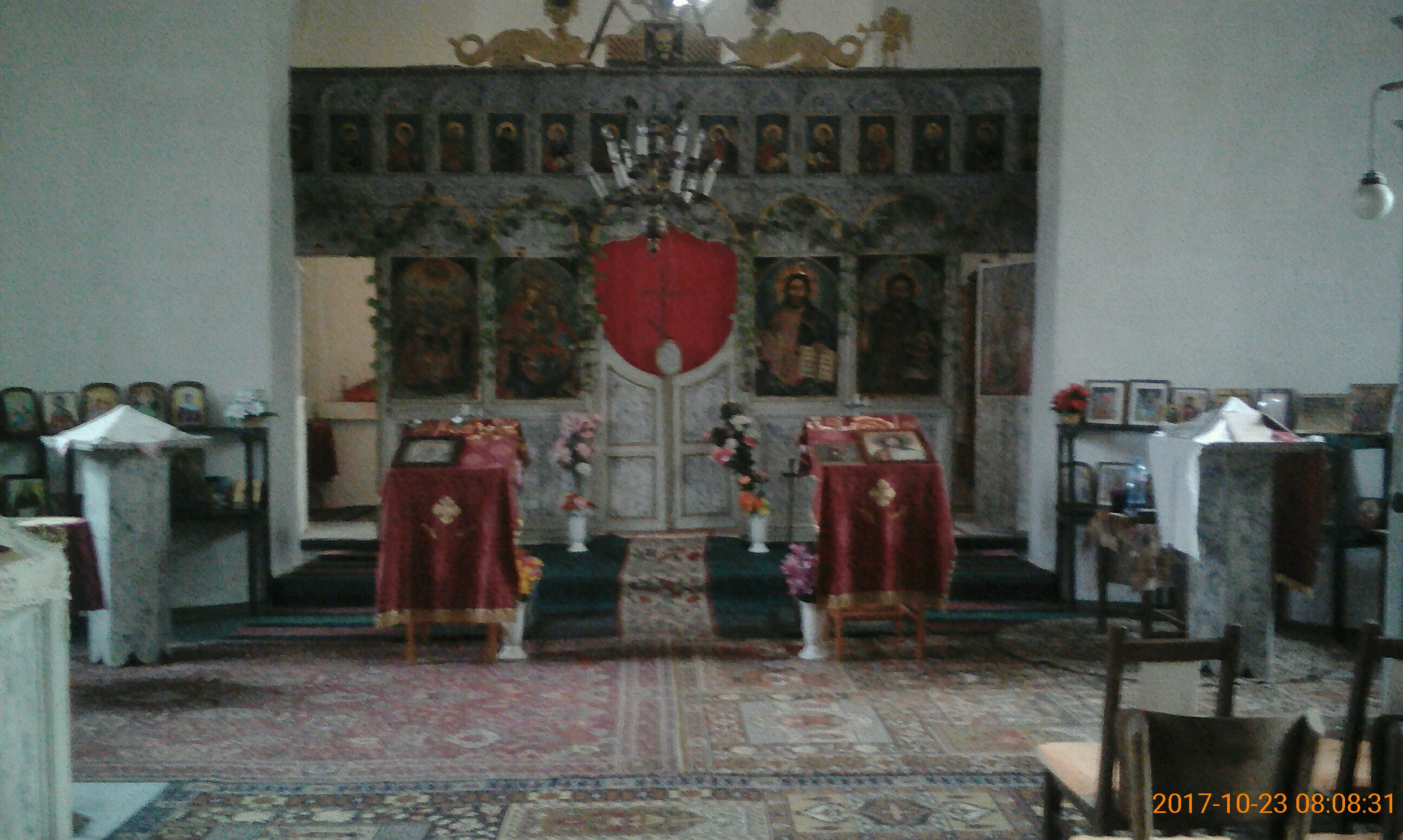 Направена на 23.10.2017 година от свещеник Михаил Михалев